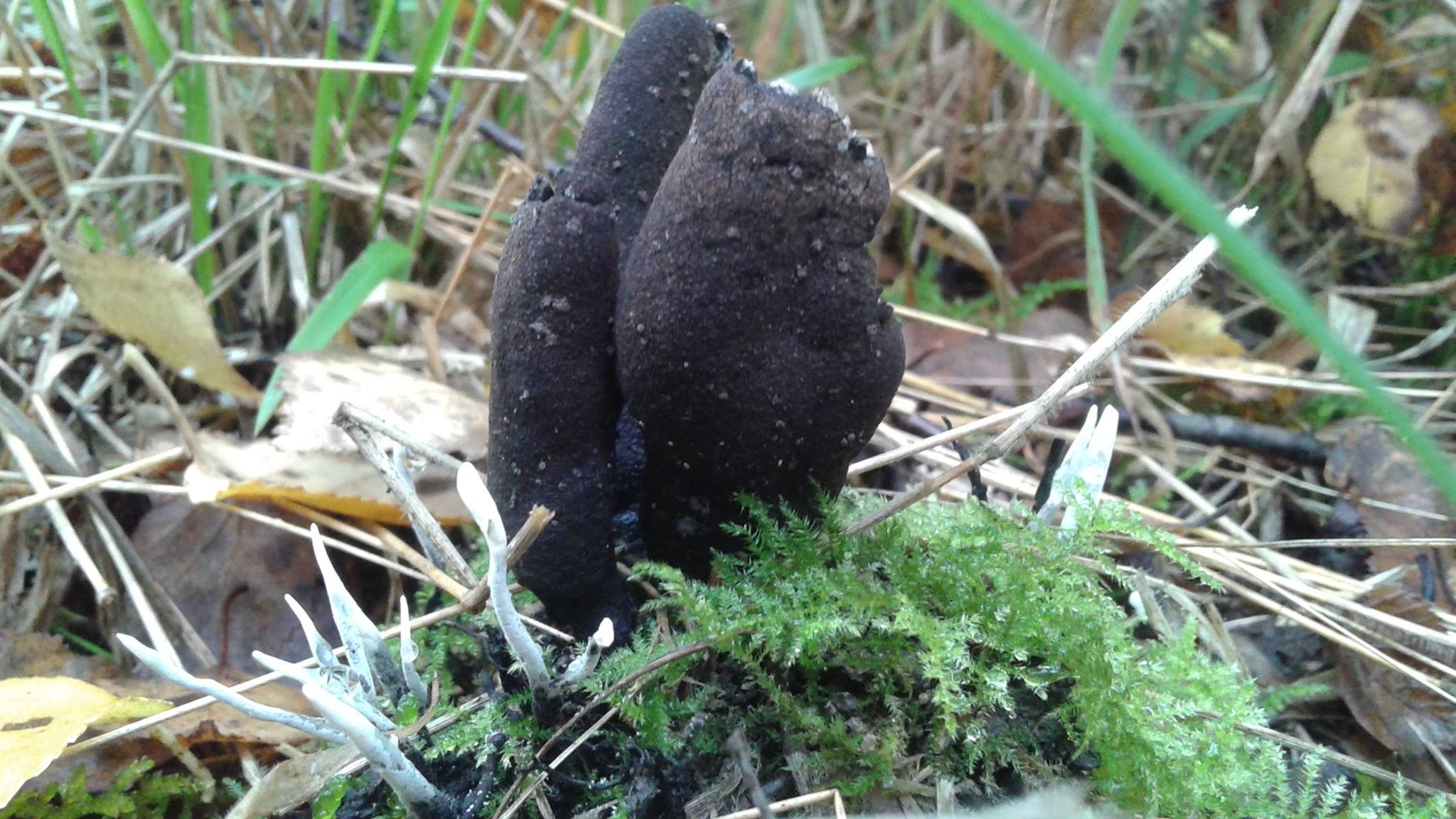 Xylaria longpipe